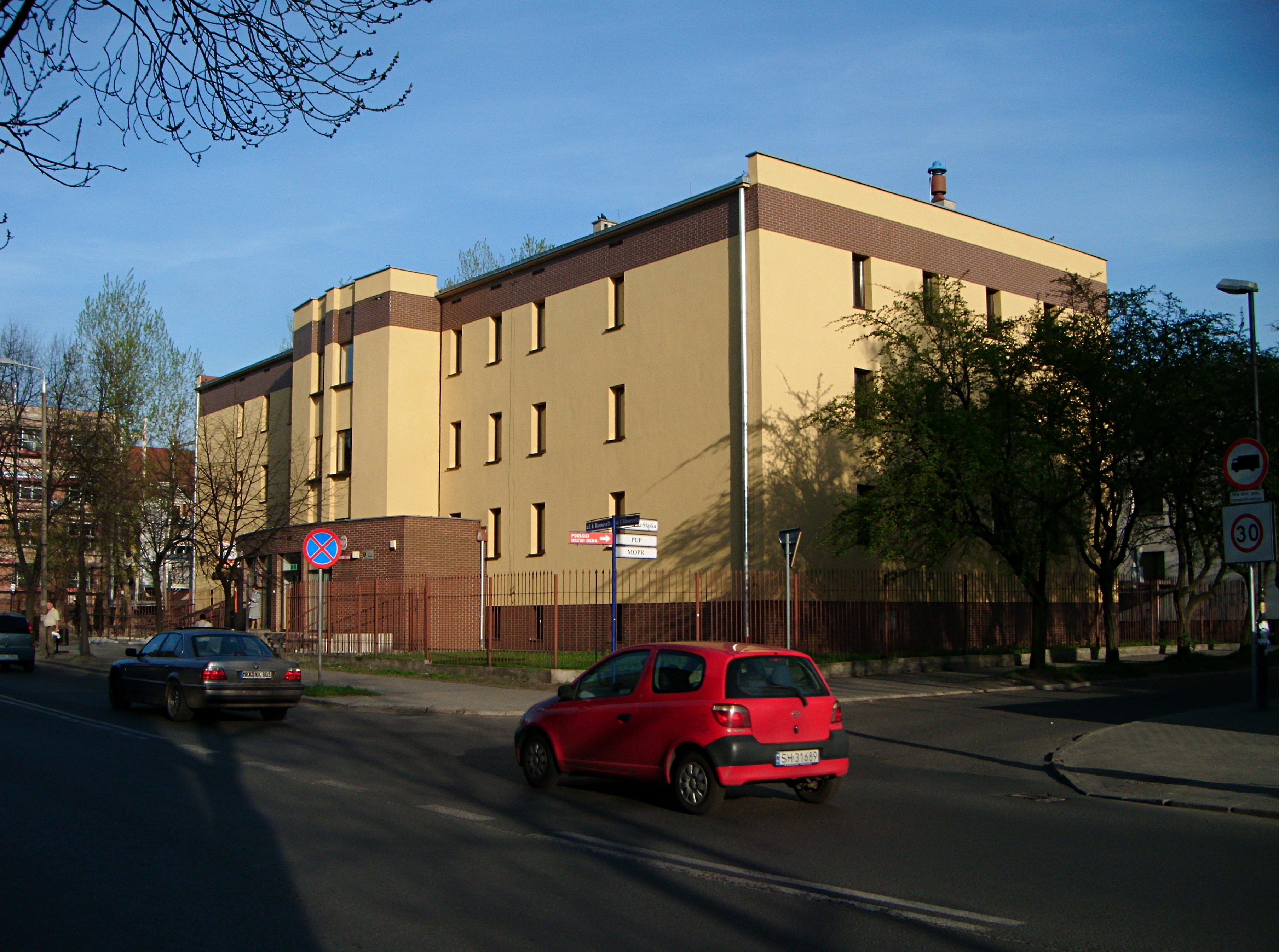 Wydział Organizacji i Zarządzania Politechniki Śląskiej w Gliwicach Budynek C. Ulica Roosevelta w Zabrzu.